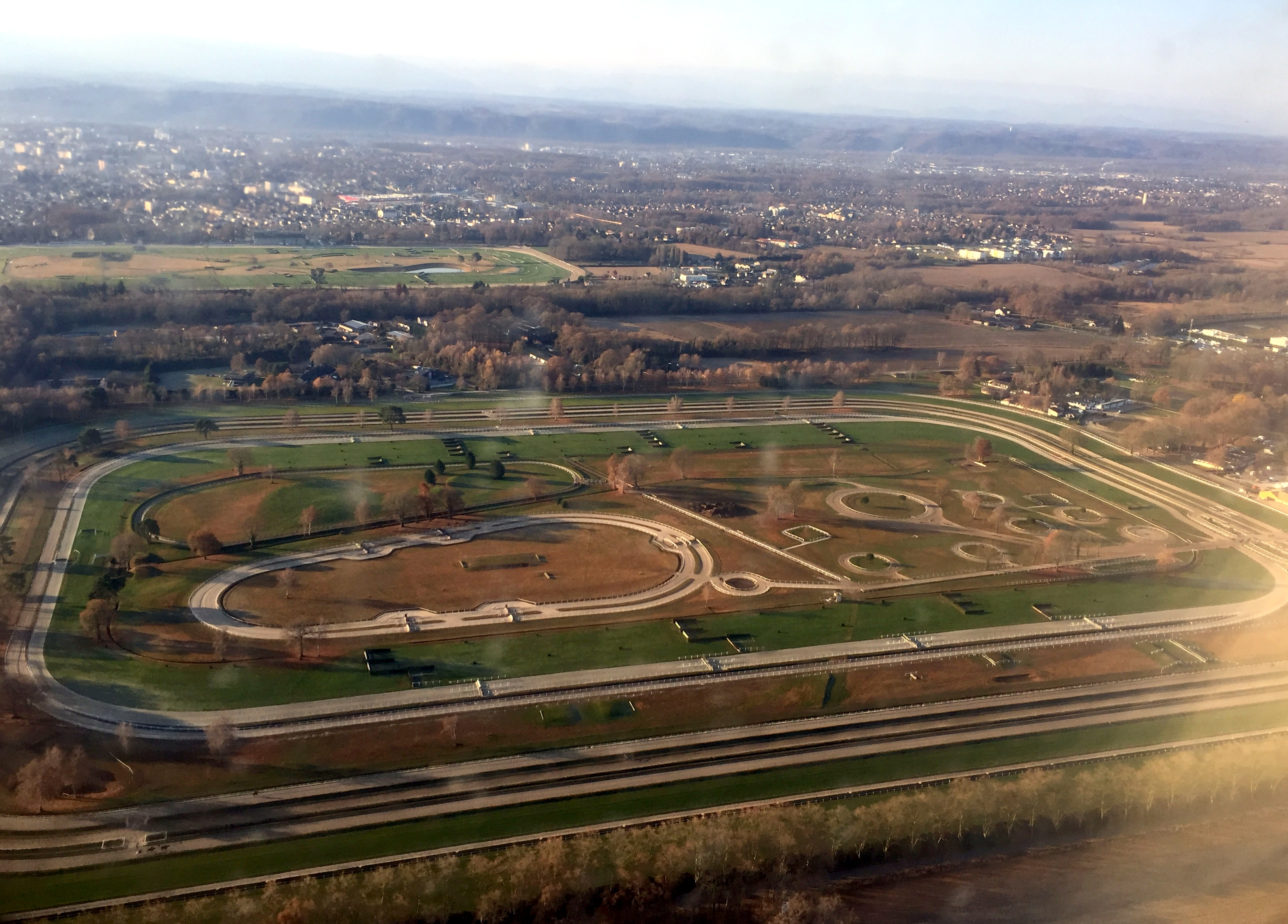 Image de Pau en décembre 2016.